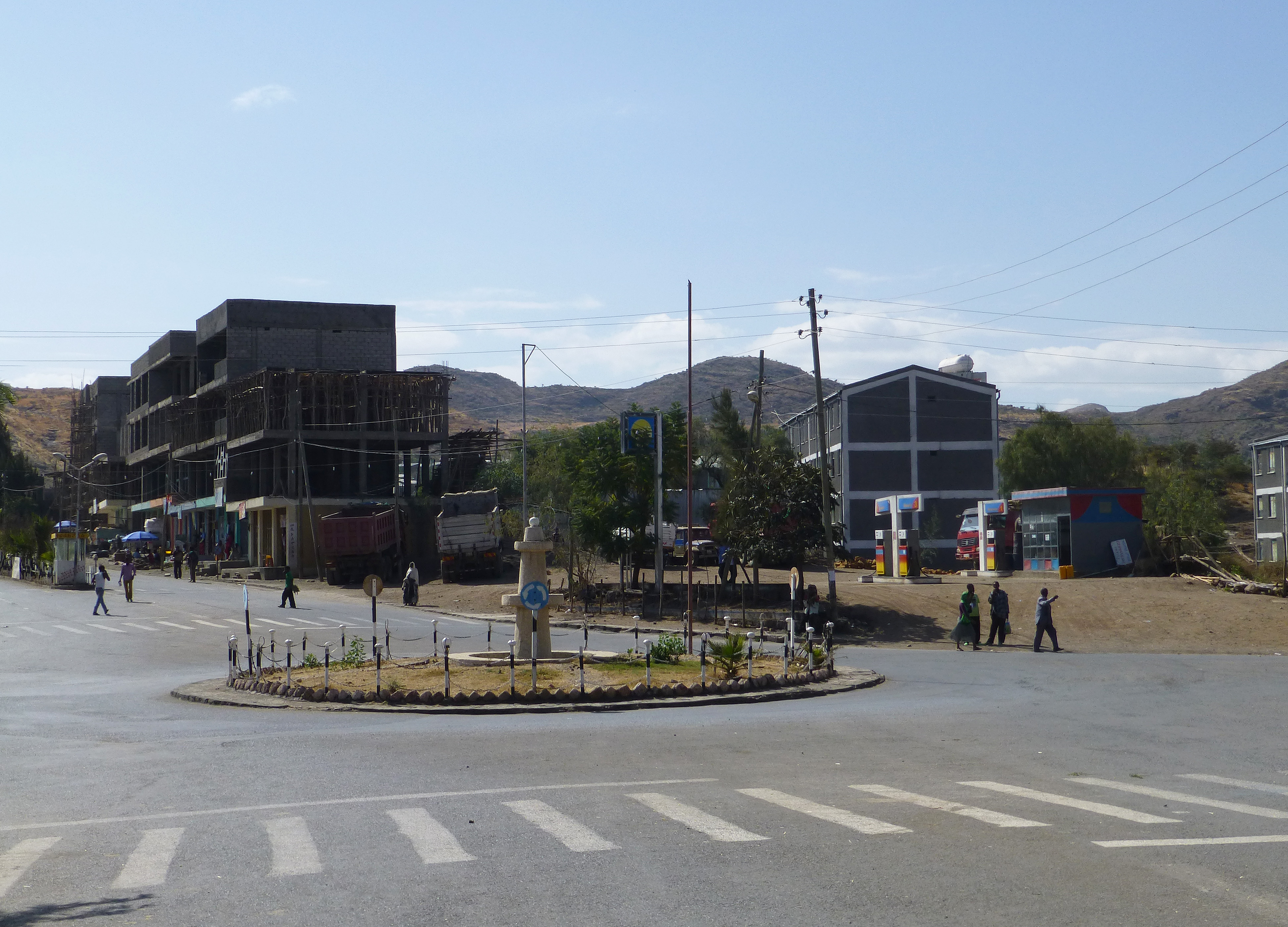 Sekota (région Amhara, Ethiopie)